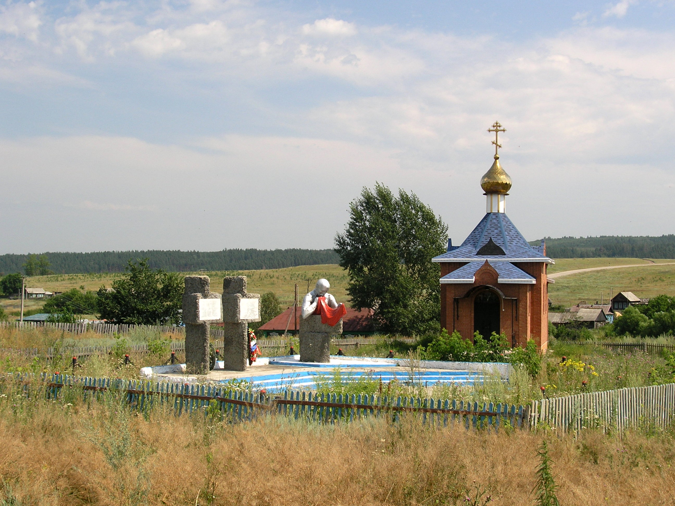 Мемориальный комплекс погибшим в годы Великой Отечественной войны, село Смолькино, Сызранский район Самарской области, Россия